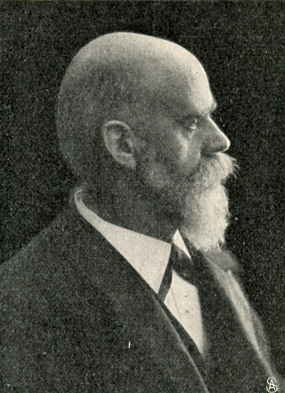 Prof. Dr. Theobald Ziegler